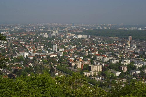 Muttenz vom Wartenberg aus fotografiert